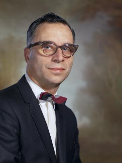 Senator R. R. Greive, 1967